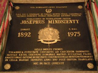 Grób Mindszentyego. Foto:Roland von Bagratuni.